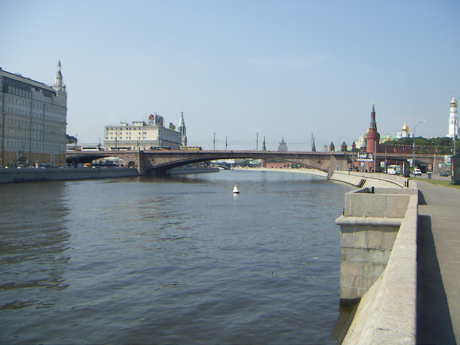 Bolshoj Moskvoretsky Bridge in Moscow